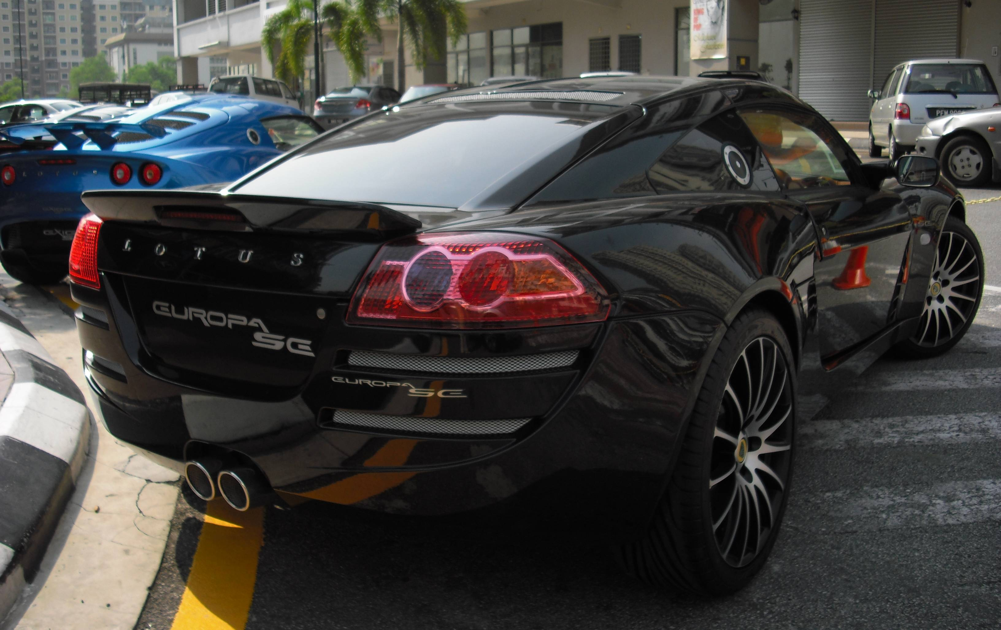 Lotus Europa SE Sportscar in Mont Kiara, Kuala Lumpur, Malaysia.